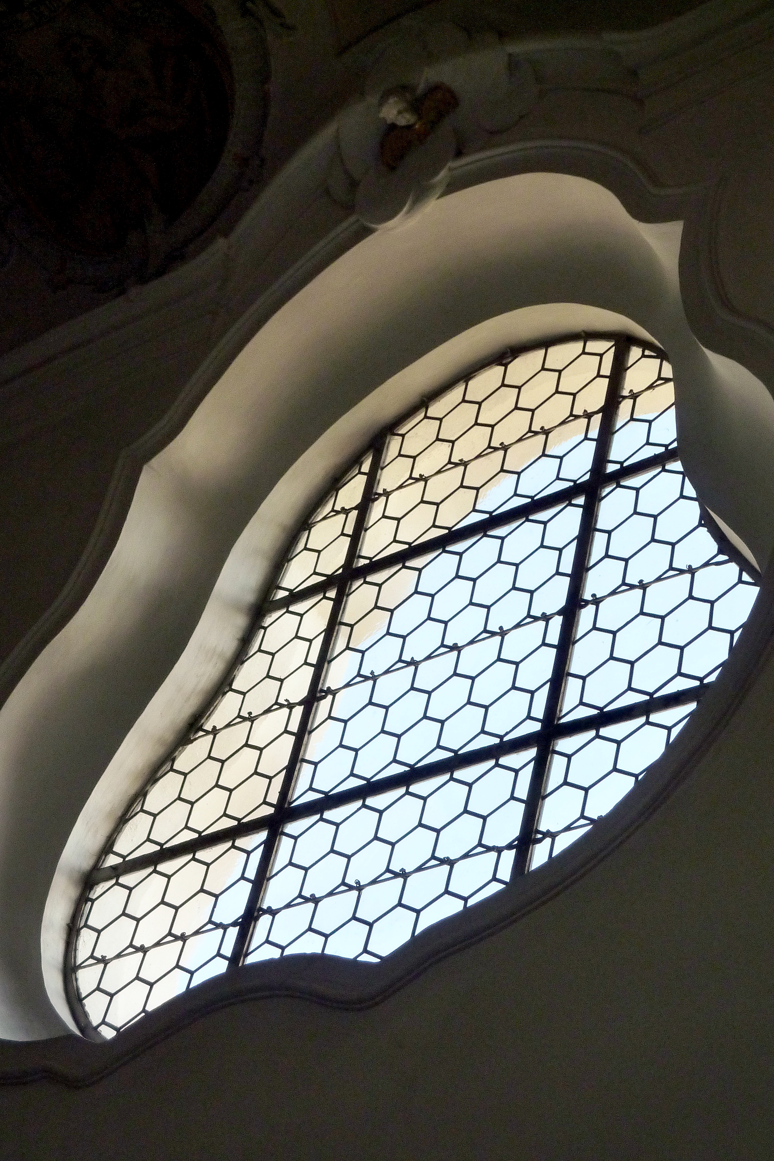 Katholische Pfarrkirche St. Ägidius in Schabringen, einem Ortsteil von Wittislingen im Landkreis Dillingen an der Donau (Bayern), Bassgeigenfenster im Chor